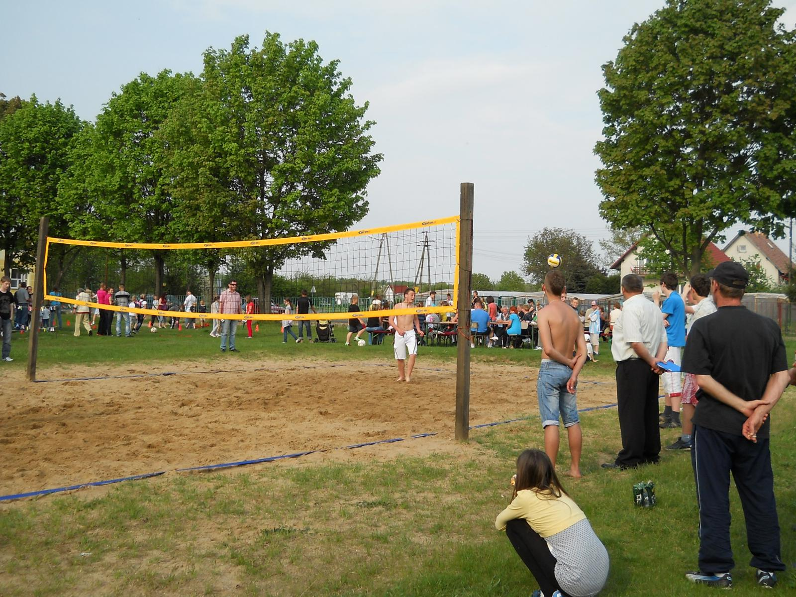 Wojcieszyce. Siatkówka plażowa